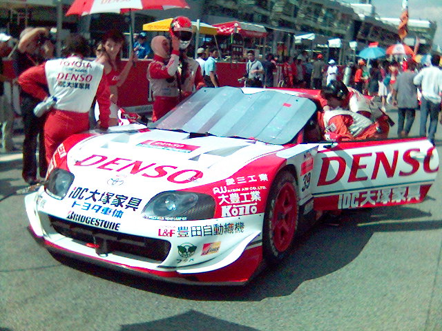 Super GTK700i-acat(111)